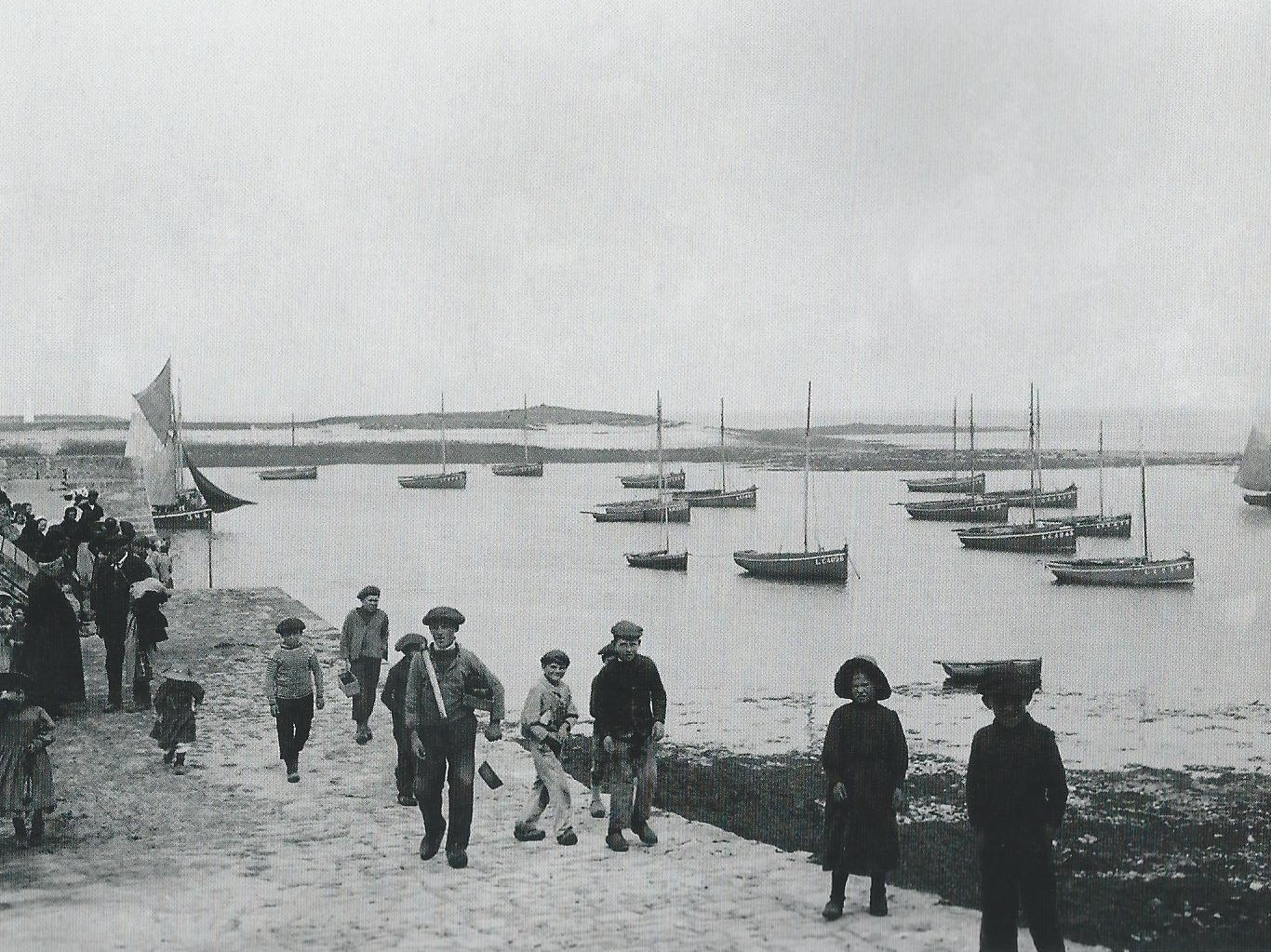 Molène en 1912 (on voit sur la photo plusieurs sloups, bateaux de pêche de l'époque, au mouillage) ; photographie prise par Jacques de Thézac.